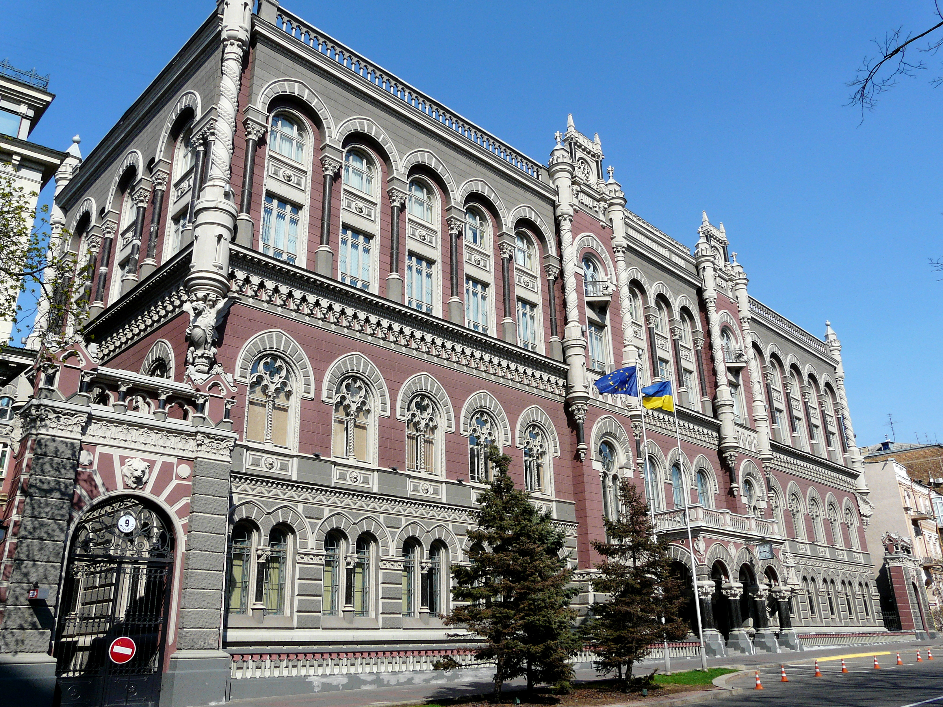 Будинок Київської контори Державного банку, якою на початку XX ст. управляв Г. О. Афанасьєв, історик, громадський діяч; на місці якого стояв житловий будинок, де у 1822–1825 роках відбувалися таємні збори декабристів, Київ, Інститутська вул., 9-а